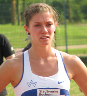 Esther Cremer beim DLV-Olympia-Testwettkampf 2012 im Sepp-Herberger-Stadion Weinheim.